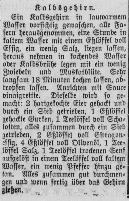 Kochrezept für Kalbshirn aus dem Wilmington Lokal-Anzeiger und Wilmington Freie Presse vom 16. Mai 1914, s. 3 (von 4)